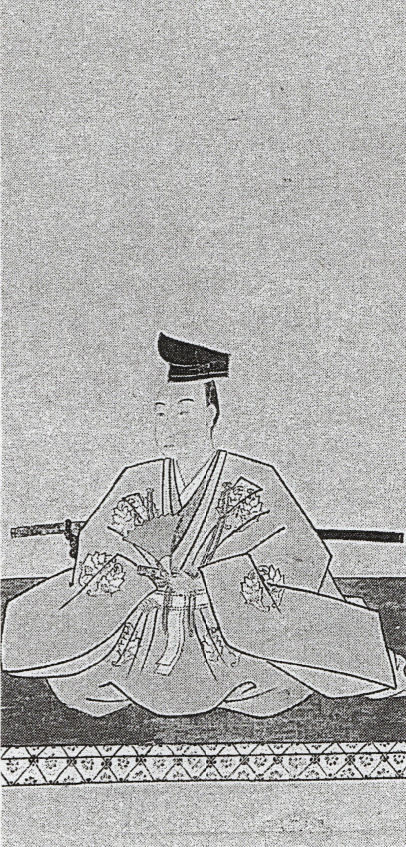 鍋島直興の肖像(モノクロ)。